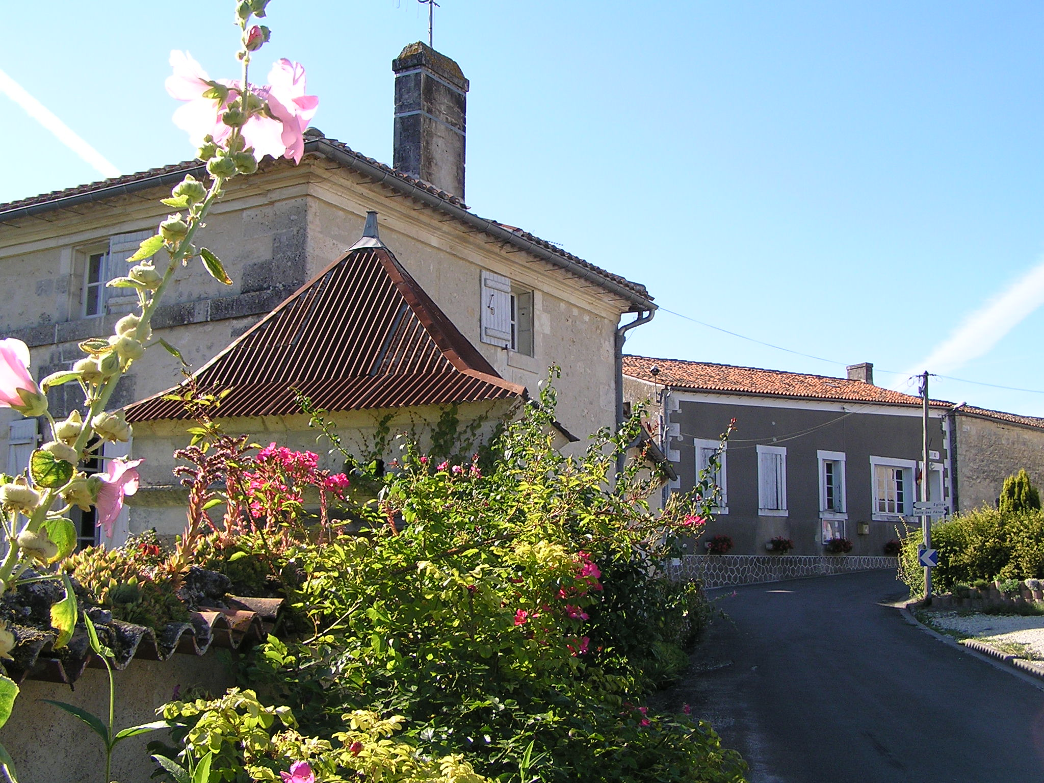 maison et pigeonnier à Birac